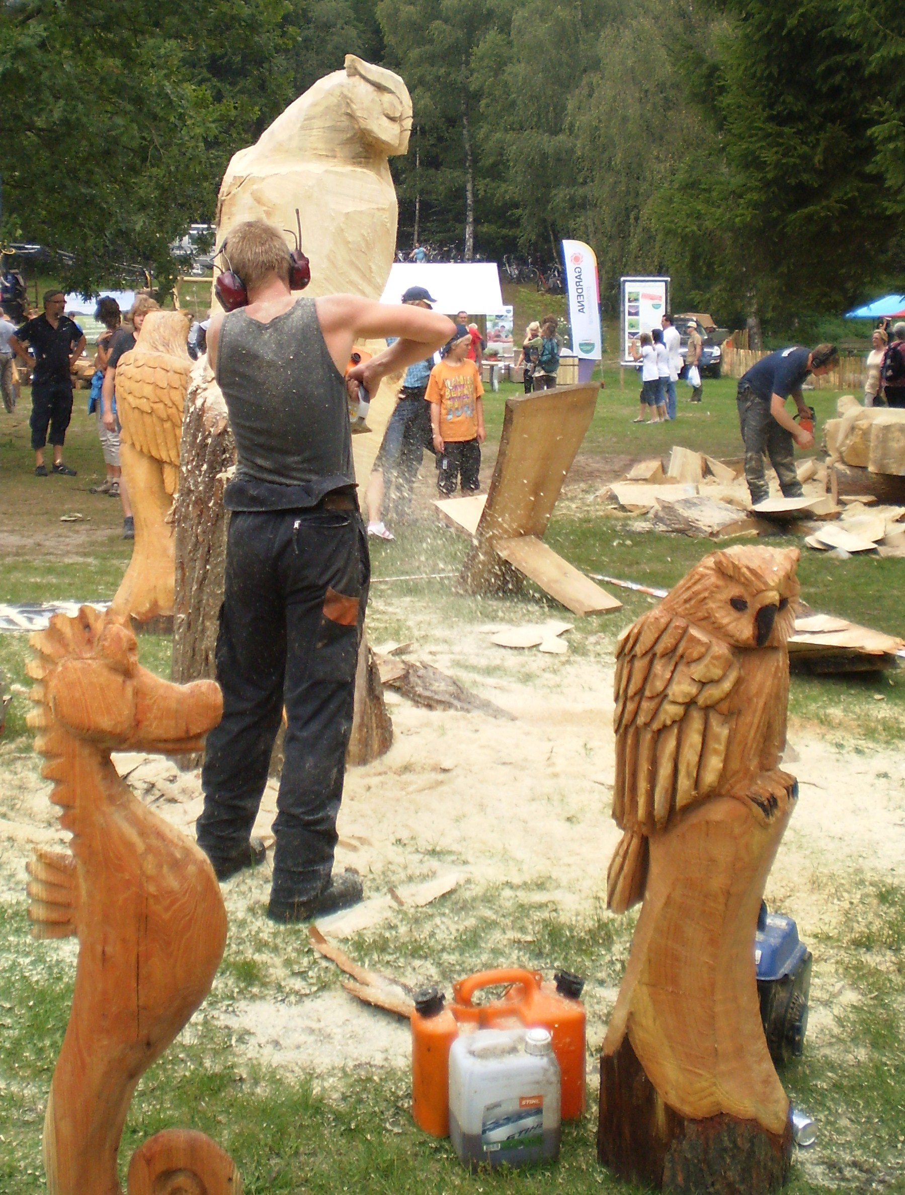 Houthakjkersfeest 2010 sculptuurzagen